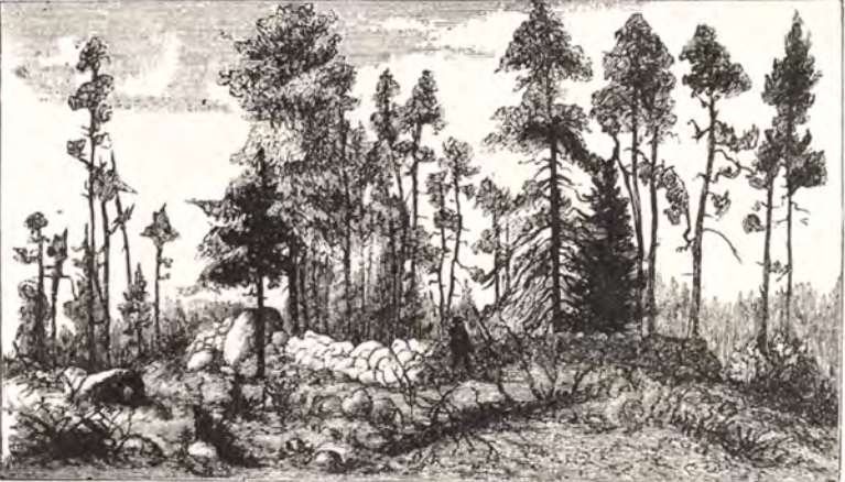 Kauttuan Linnavuori, Eura